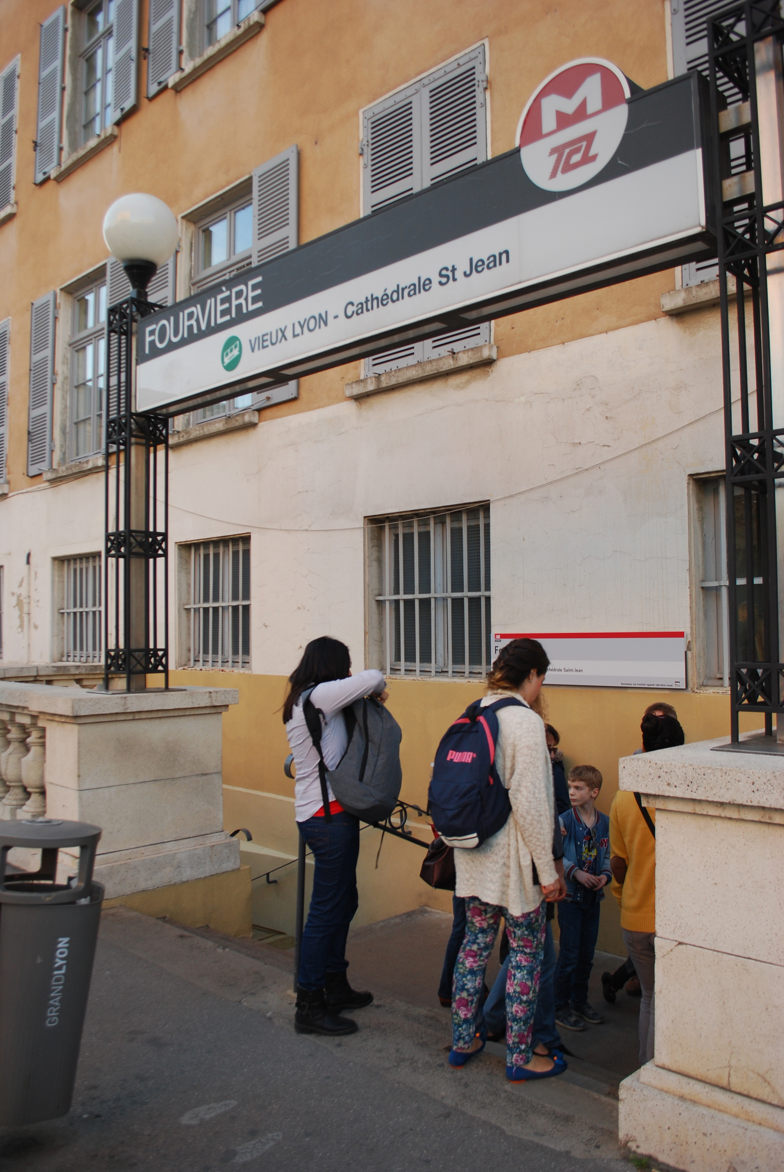 Vue de Lyon.